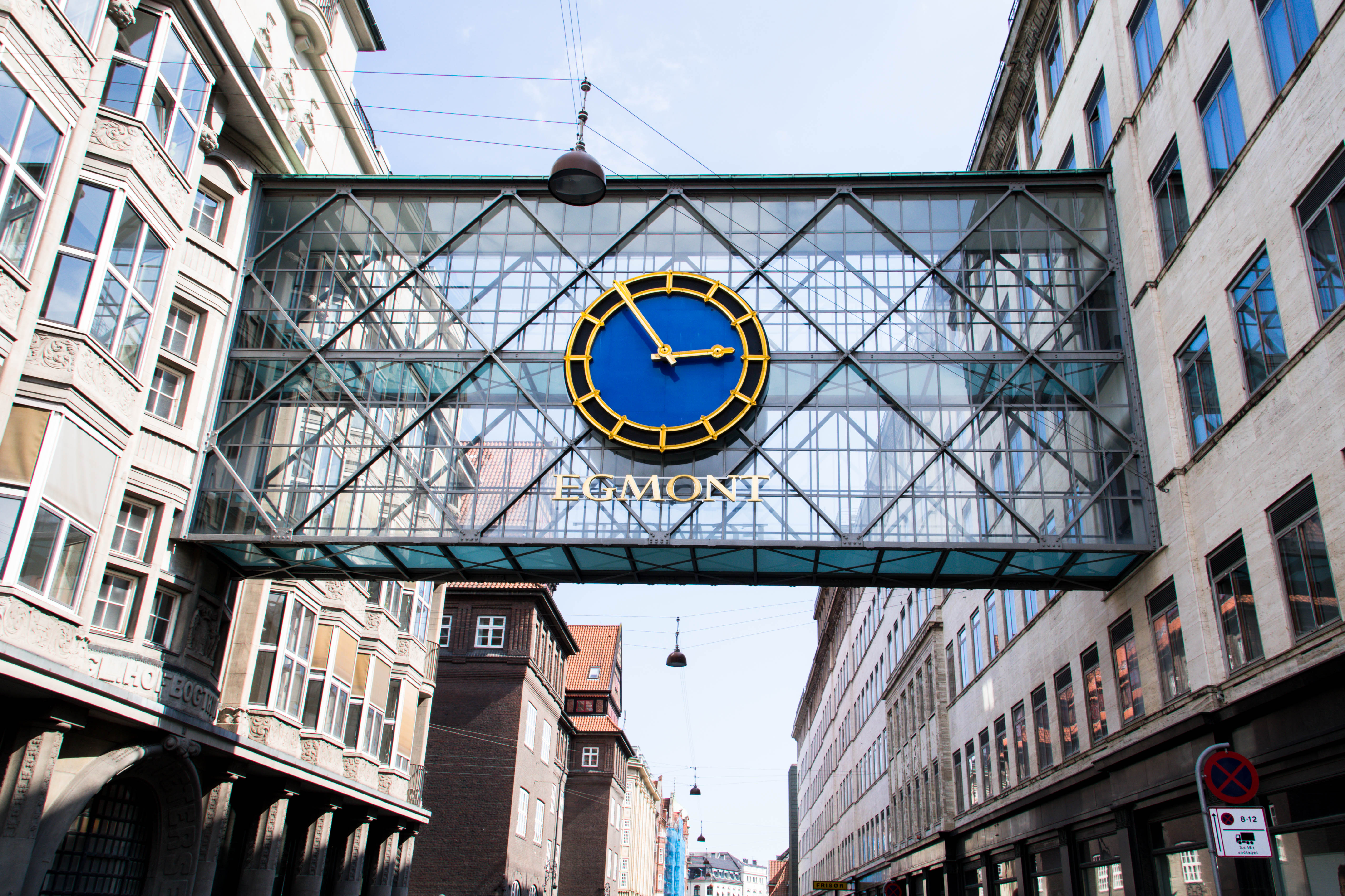 Gutenberghus skyway in Copenhagen, Denmark